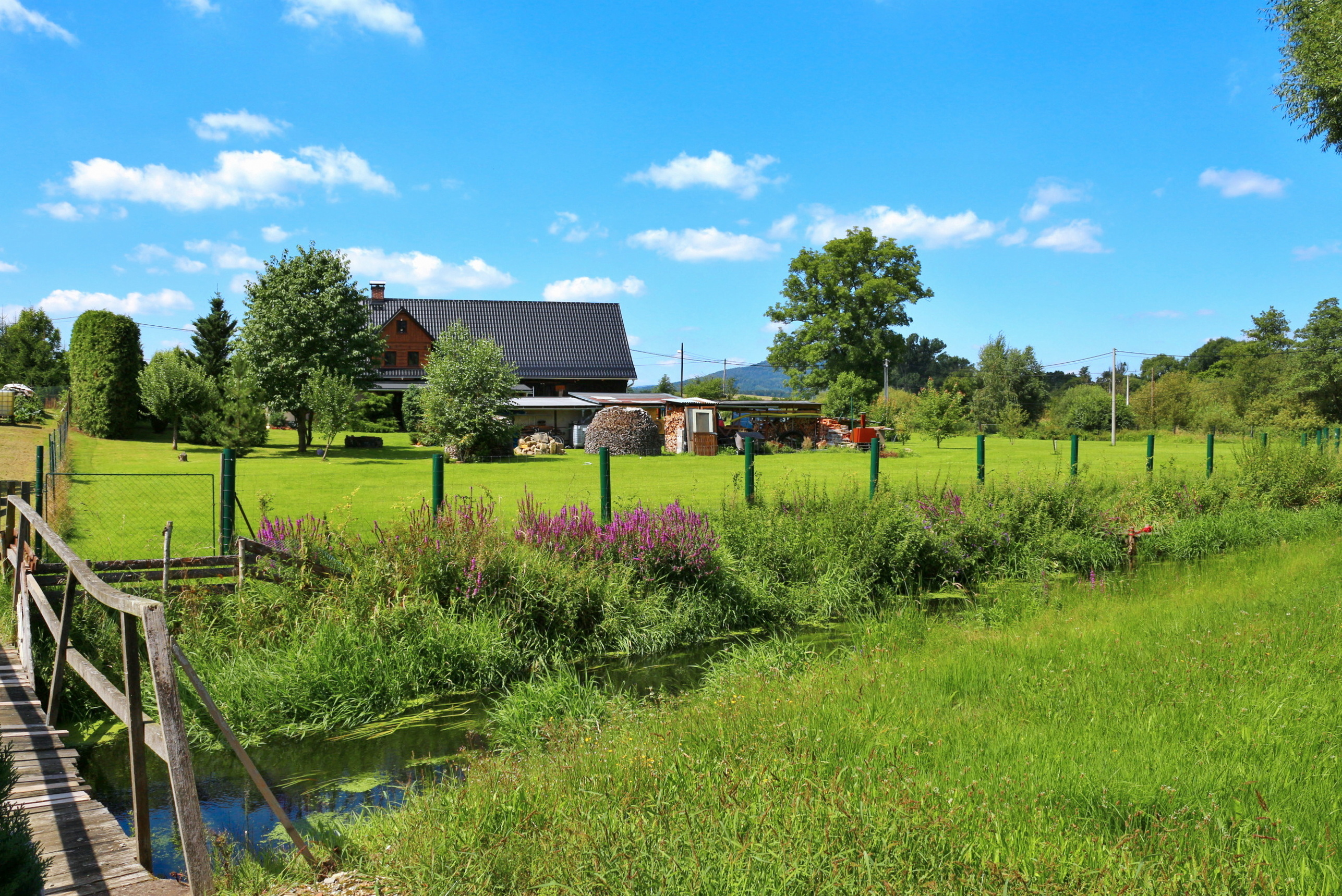 Panenský potok ve Velkém Valtinově